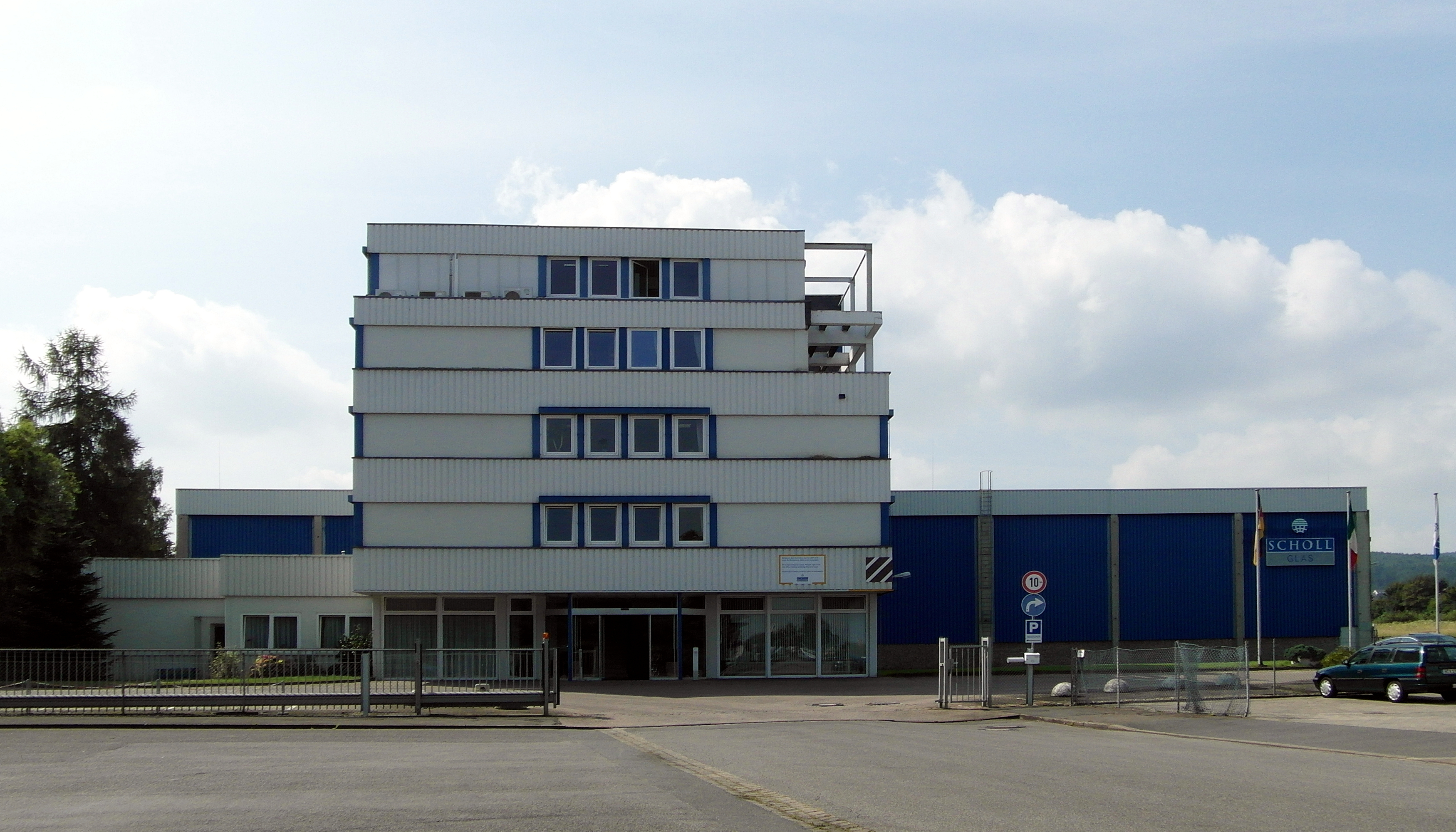 Schollglas-Gebäude in der Schollstraße in Barsinghausen